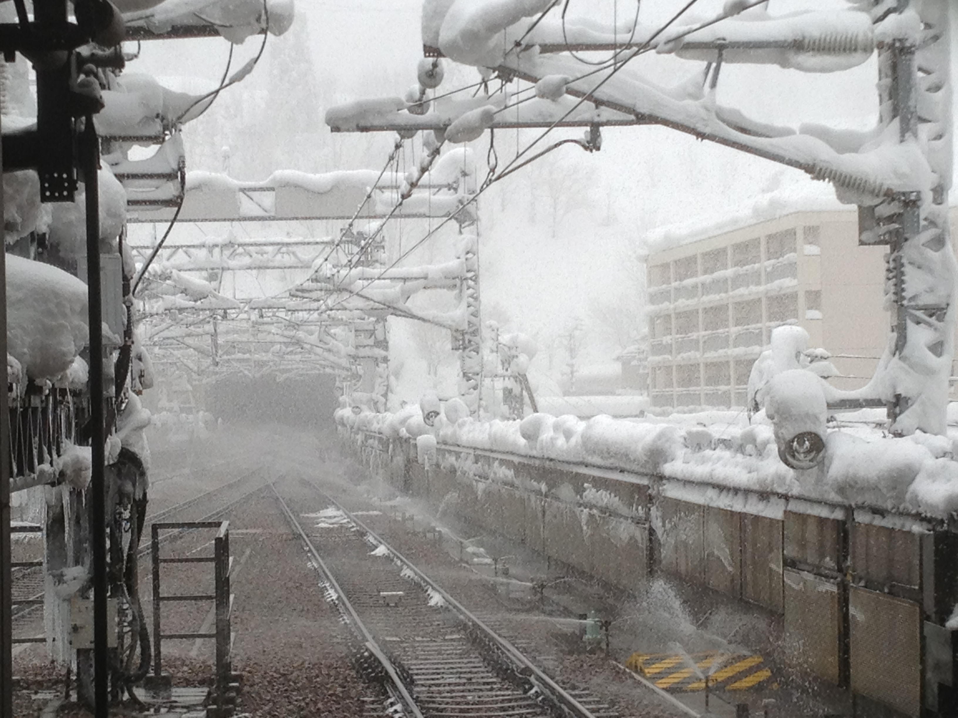 上越新幹線越後湯沢駅の新幹線下りホームから東京側の線路を撮影